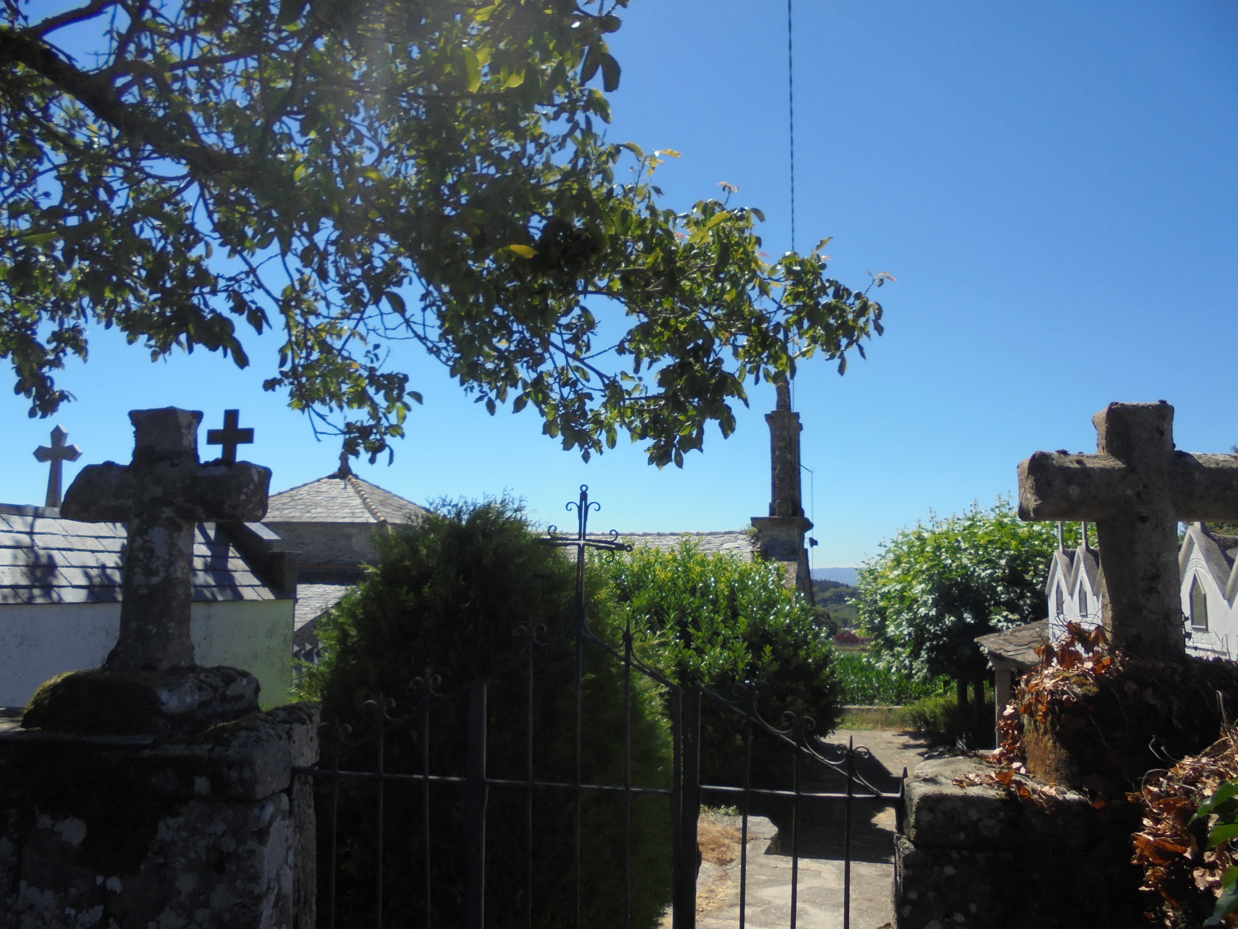 Igrexa parroquial de Santa Cristina de San Román (Lugo)